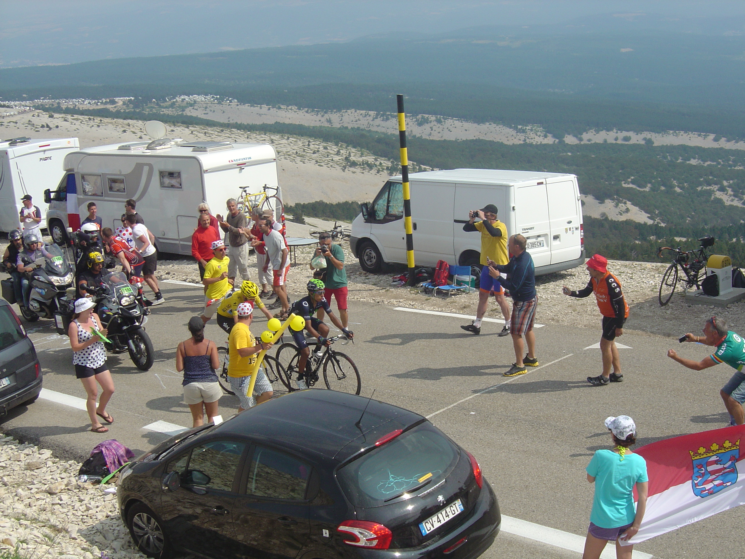 15ème étape du Tour de France 2013 entre Givors et le Mont Ventoux. Arrivée au Mont Ventoux. Christopher Froom et Nairo Quintana à 1,5 km du sommet juste avant l'attaque du coureur britannique.